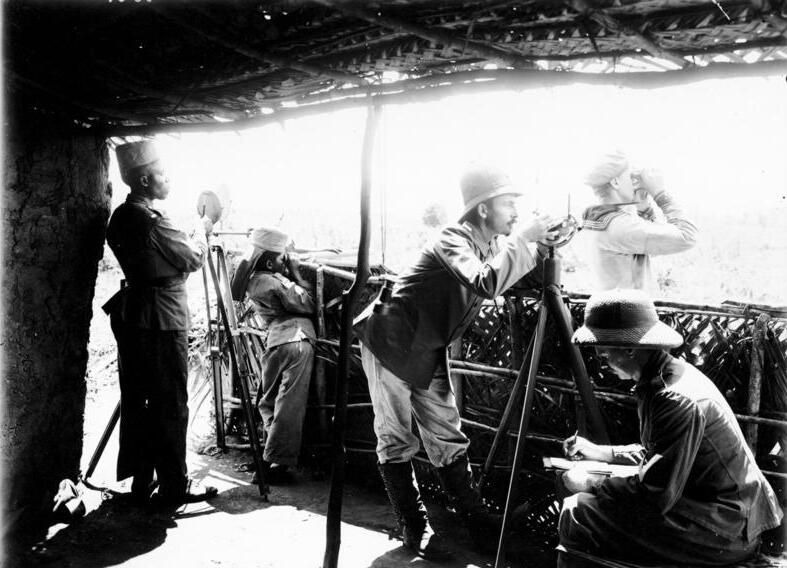 Ausflug